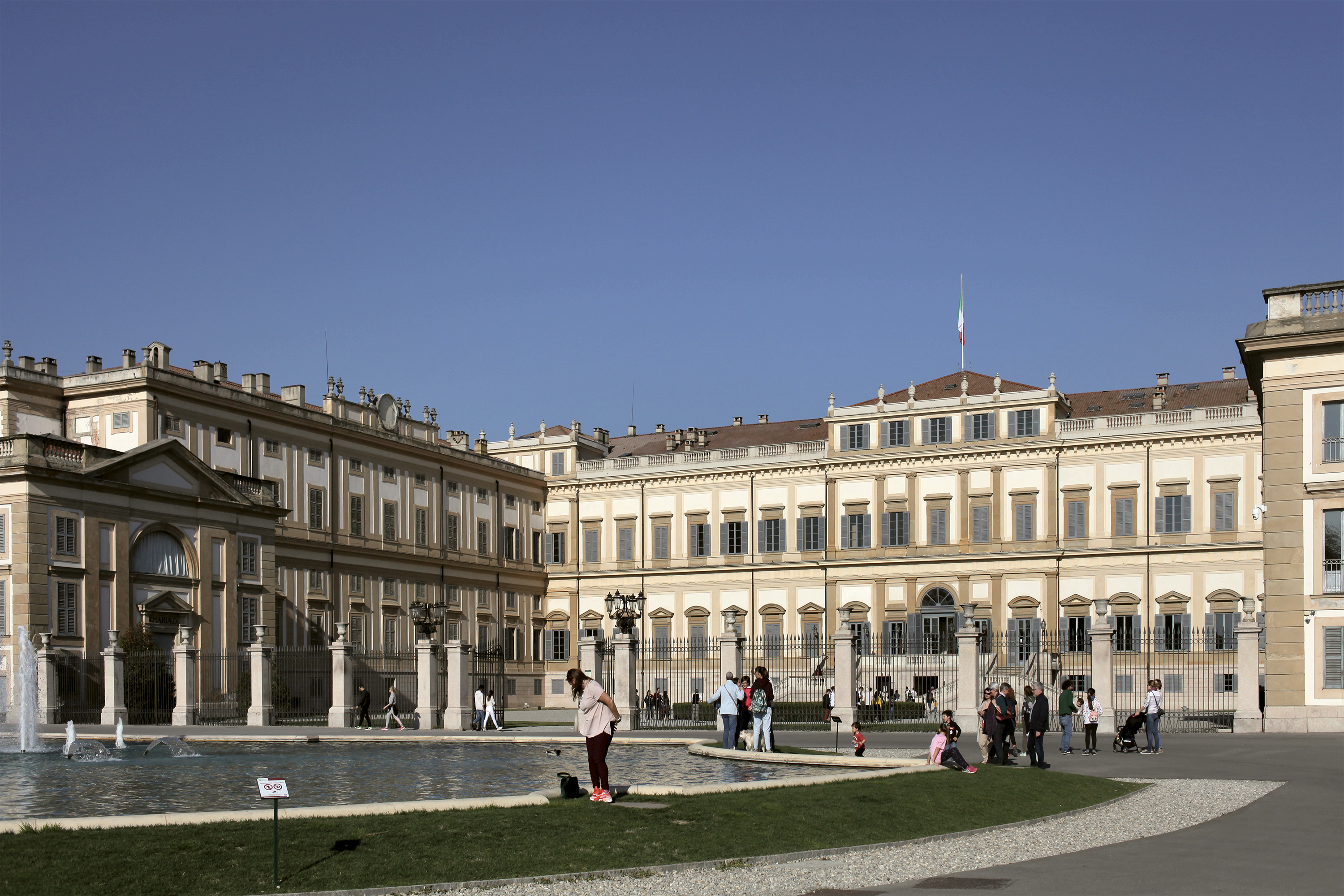 Villa Reale di Monza (Giuseppe Piermarini, 1777-1780), veduta di tre quarti